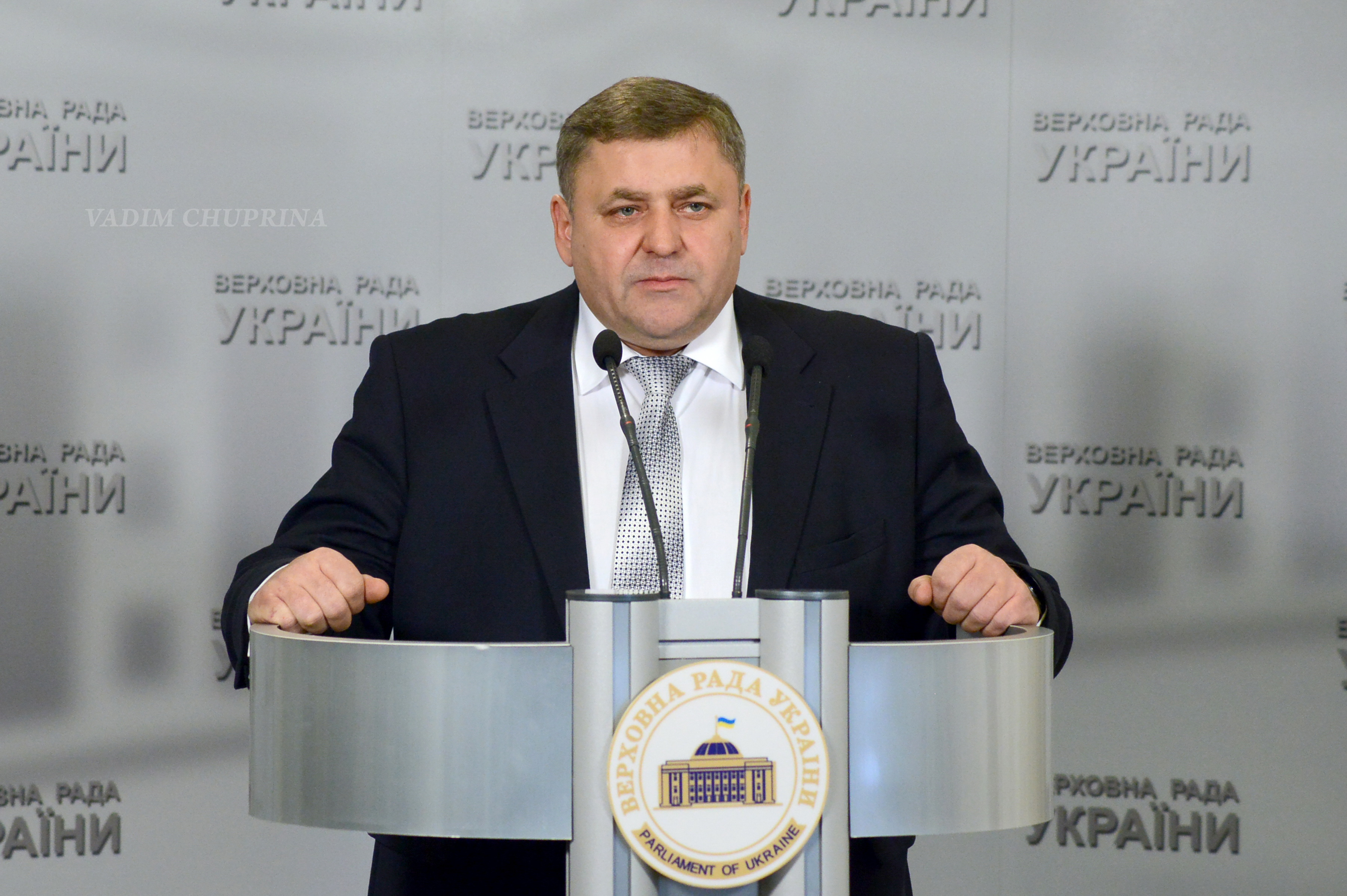 ВЕРХОВНАЯ РАДА УКРАИНЫ 2015 , фото Вадим Чуприна